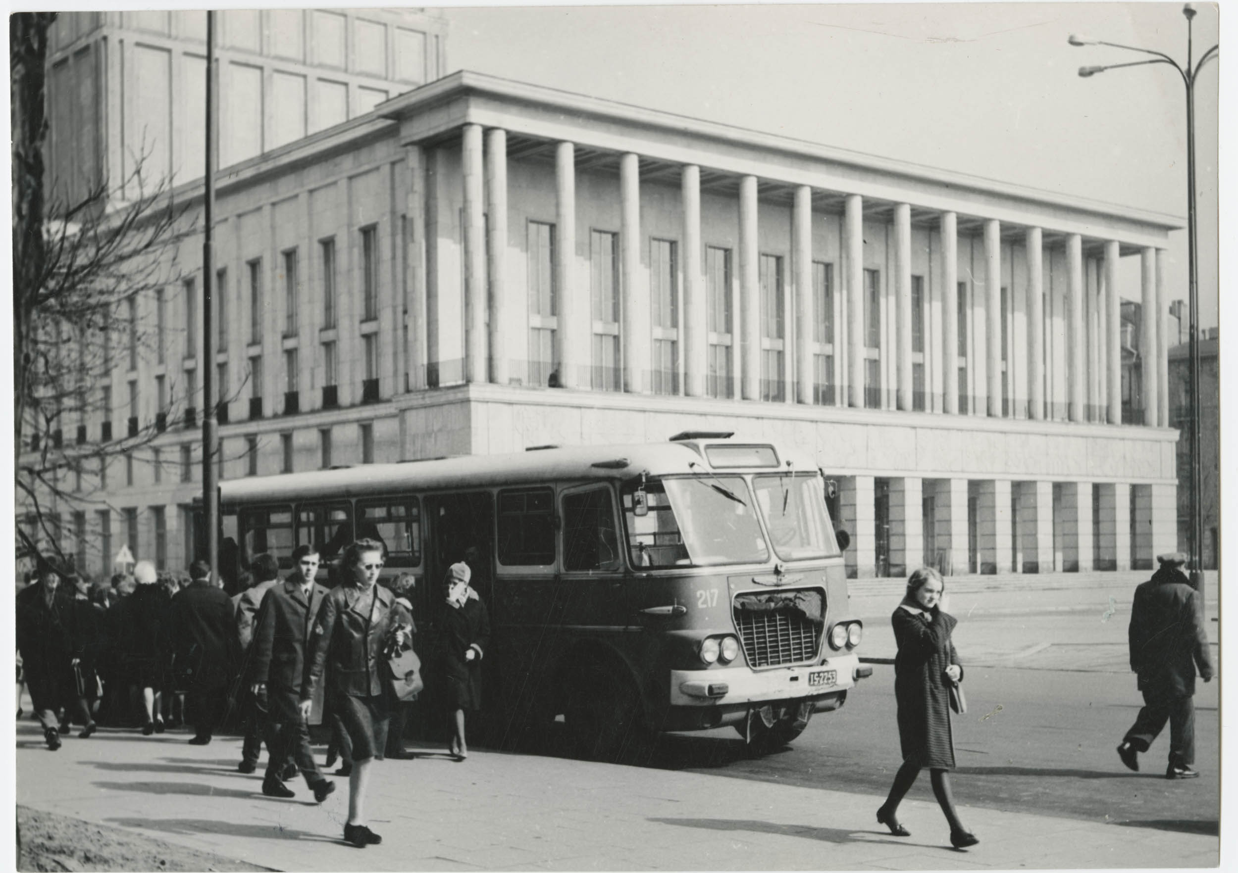 Fotografia przedstawia budynek Teatru Wielkiego na placu Dąbrowskiego widziany od strony południowo-zachodniej. Na pierwszym planie widoczny jest autobus komunikacji miejskiej marki Ikarus 620, używany przez łódzkie MPK do 1978 roku. Historia teatru na Placu Dąbrowskiego sięga 1948 roku, kiedy został powołany Komitet Budowy Teatru Narodowego w Łodzi pod przewodnictwem Leona Schillera. Jesienią 1948 roku został ogłoszony konkurs architektoniczny na projekt budynku teatru oraz plan zagospodarowania placu Dąbrowskiego wraz z organizacją istniejącej i planowanej komunikacji w tym rejonie. W konkursie wyłoniono dwa projekty, które otrzymały równorzędne II nagrody, ponieważ nie spełniały one jednak przyjętych założeń formalnych powrócono do projektu Teatru Miejskiego dla Łodzi przygotowanego w 1924 roku przez Czesława Przybylskiego. Przygotowanie projektu realizacyjnego prowadził zespół łódzkich projektantów: Józef i Witold Korscy oraz Roman Szymborski, a funkcjonalne założenia projektu powstały przy współudziale między innymi Leona Schillera i Erwina Axera. 19 stycznia 1967 roku podczas koncertu inauguracyjnego wykonano miedzy innymi uwerturę do opery Halka Moniuszki i arię Kończaka z II aktu opery Kniaź Igor Borodina w wykonaniu Andrzeja Saciuka, pod dyrekcją Zygmunta Latoszewskiego, arię Hanny z IV aktu opery Straszny dwór Moniuszki w wykonaniu Delfiny Ambroziak pod dyrekcją Mieczysława Wojciechowskiego oraz Wstęp, Intermezzo i Farandolę z opery Carmen Bizeta pod dyrekcją Józefa Klimanka. Do 2010 roku w teatrze przedstawiono publiczności ponad 300 premier, wśród których były klasyczne dzieła operowe i baletowe, musicale i operetki, a także kompozycje wybitnych współczesnych twórców polskich. W okresie od stycznia 2012 do kwietnia 2013 roku budynek Teatru Wielkiego przeszedł modernizację.